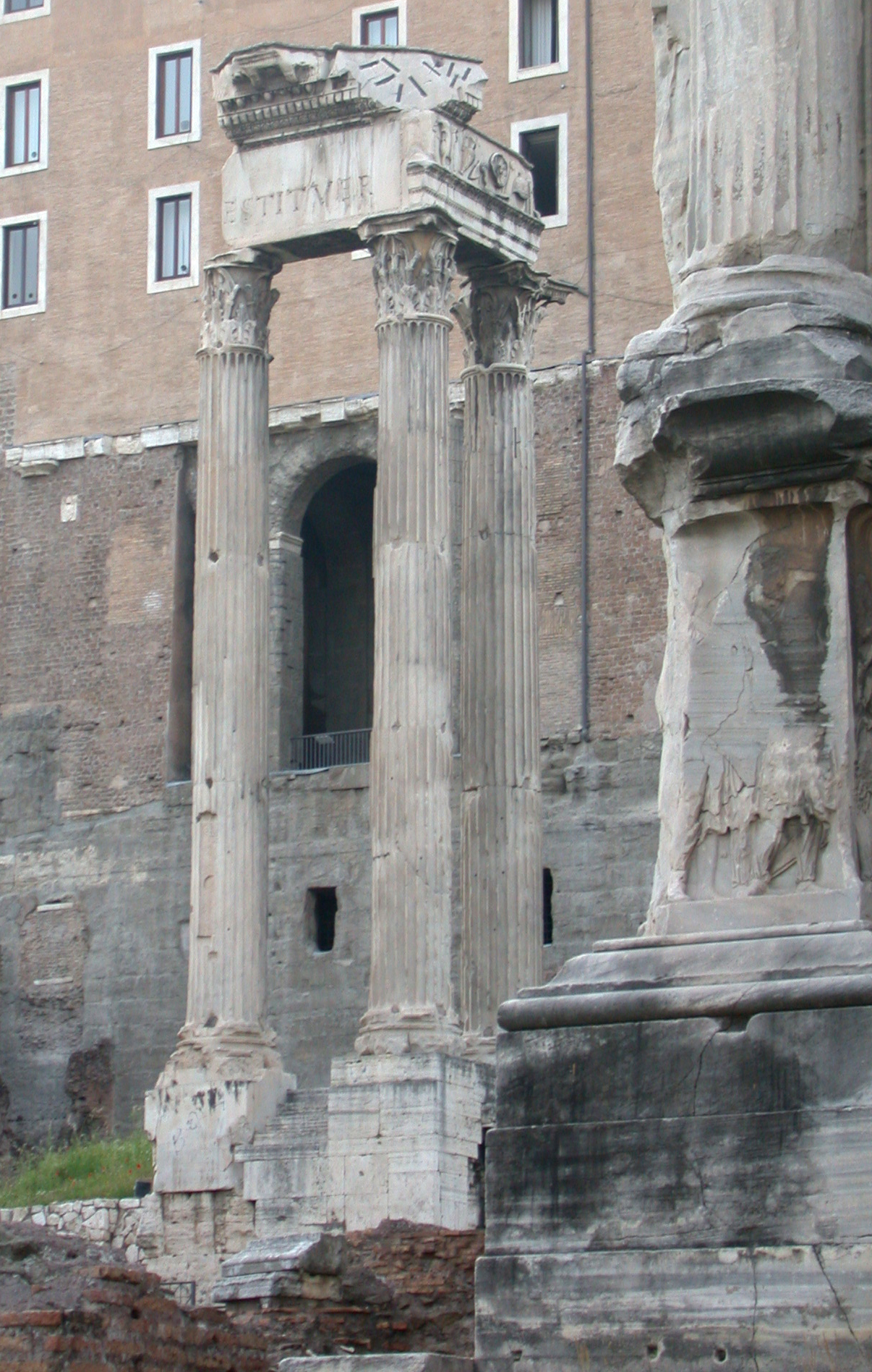 Roma, Foro Romano, tempio del divo Vespasiano. Foto personale (maggio 2005) by MM in it.wiki. XVIII secolo. / 18th century. Oggi. / Nowadays.